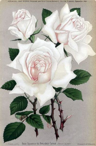 'Souvenir du Président Carnot' (Pernet-Ducher 1894), rose hybride de thé représentée en septembre 1895 dans le Journal des roses, pages 132-133.